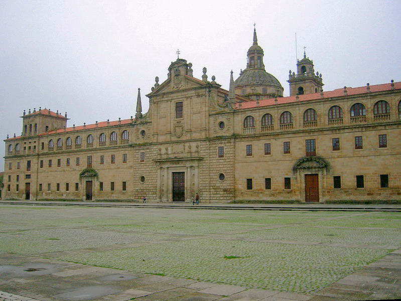 Colegio de Nuestra Señora la Antigua Monforte de Lemos, Lugo, Galicia. (Fotografía tomada el 5 de Noviembre de 2005 con mi cámara Canon IXUS V2.)